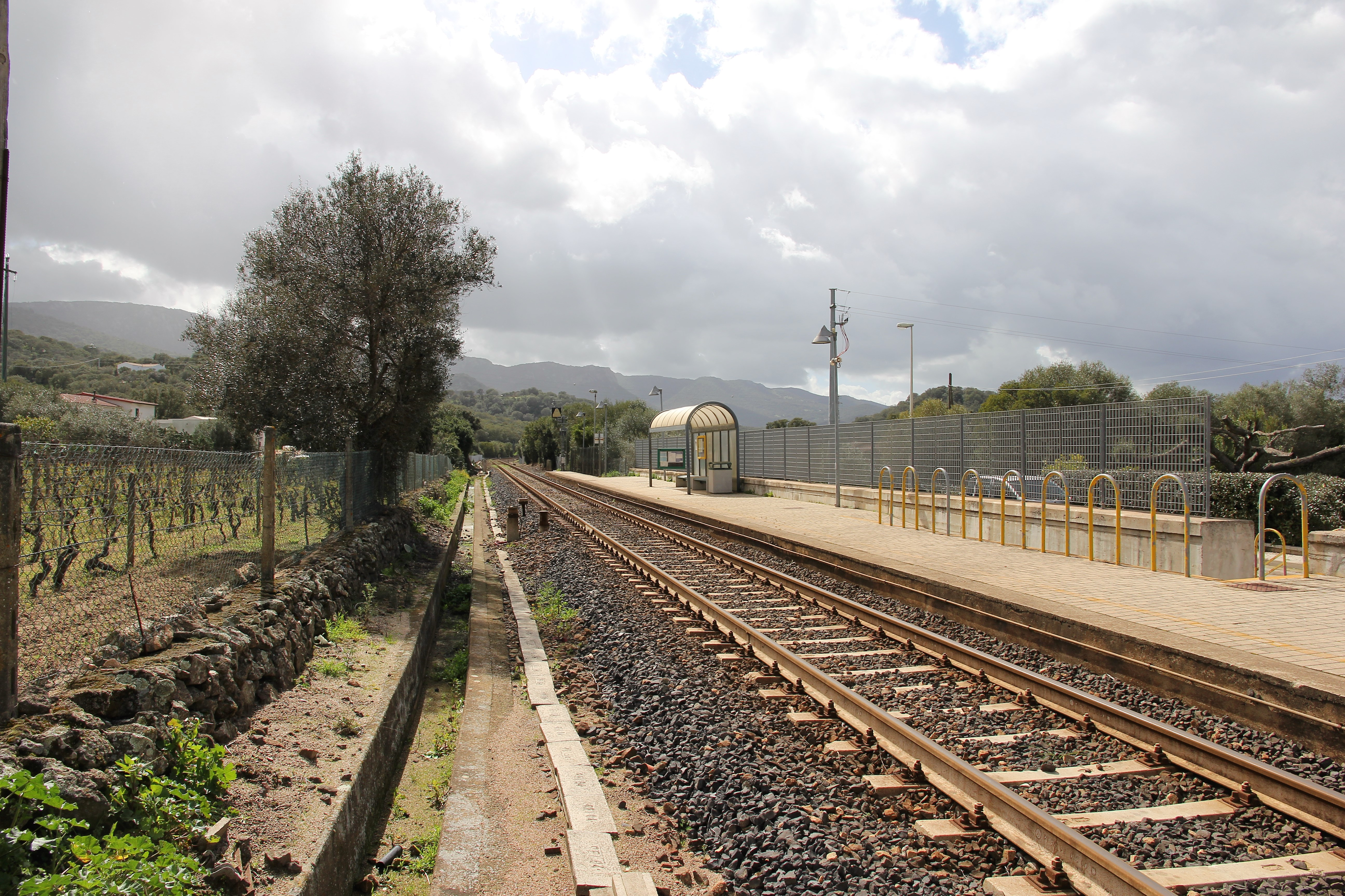 Monti, stazione ferroviaria di Su Canale